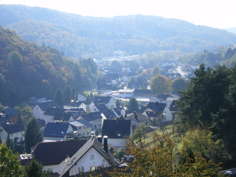 Ansichten von Oberscheld